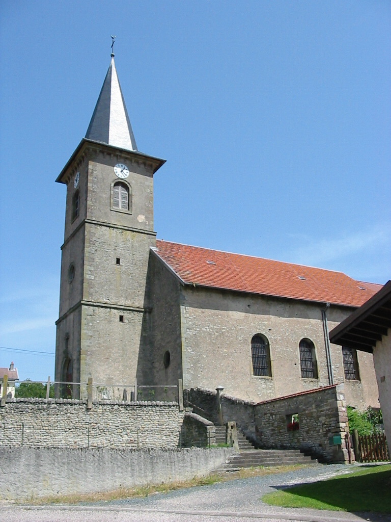 L'église à Nossoncourt, commune des Vosges